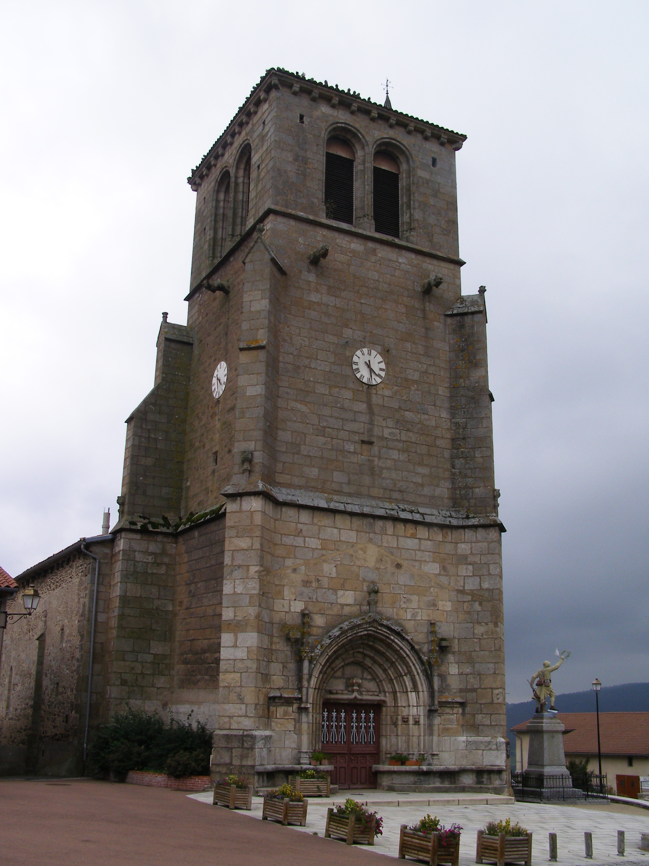 Église Saint-Just de Saint-Just-en-Bas, (Inscrit, 1933) .